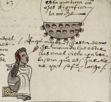 Codex Mendoza f. 63r detail: priest-astronomer